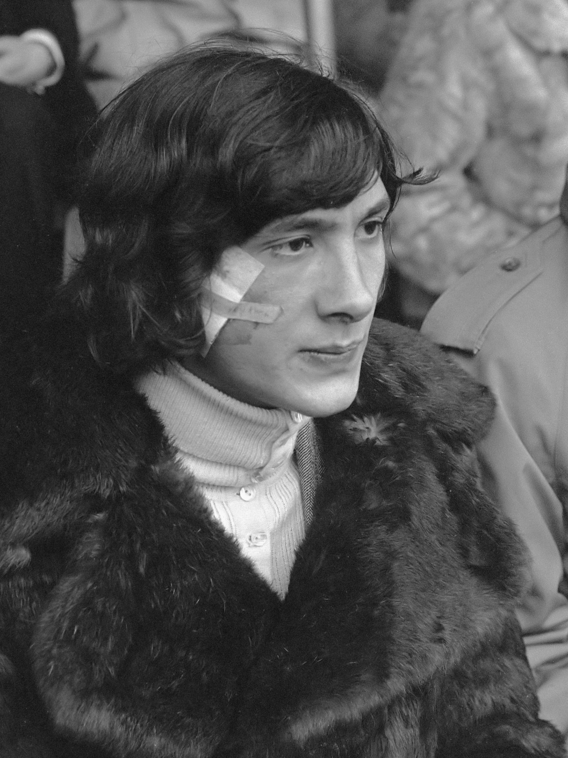 Feyenoord tegen NAC 3-1, Ladinsky (met kaakfractuur) op tribune 19 december 1971